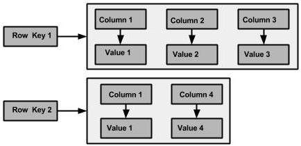 Монгол: asd